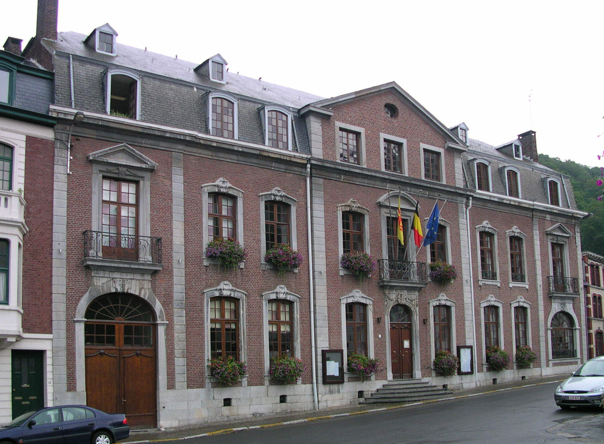 Spa (Belgique), hotel de ville - stadhuis - Rathaus